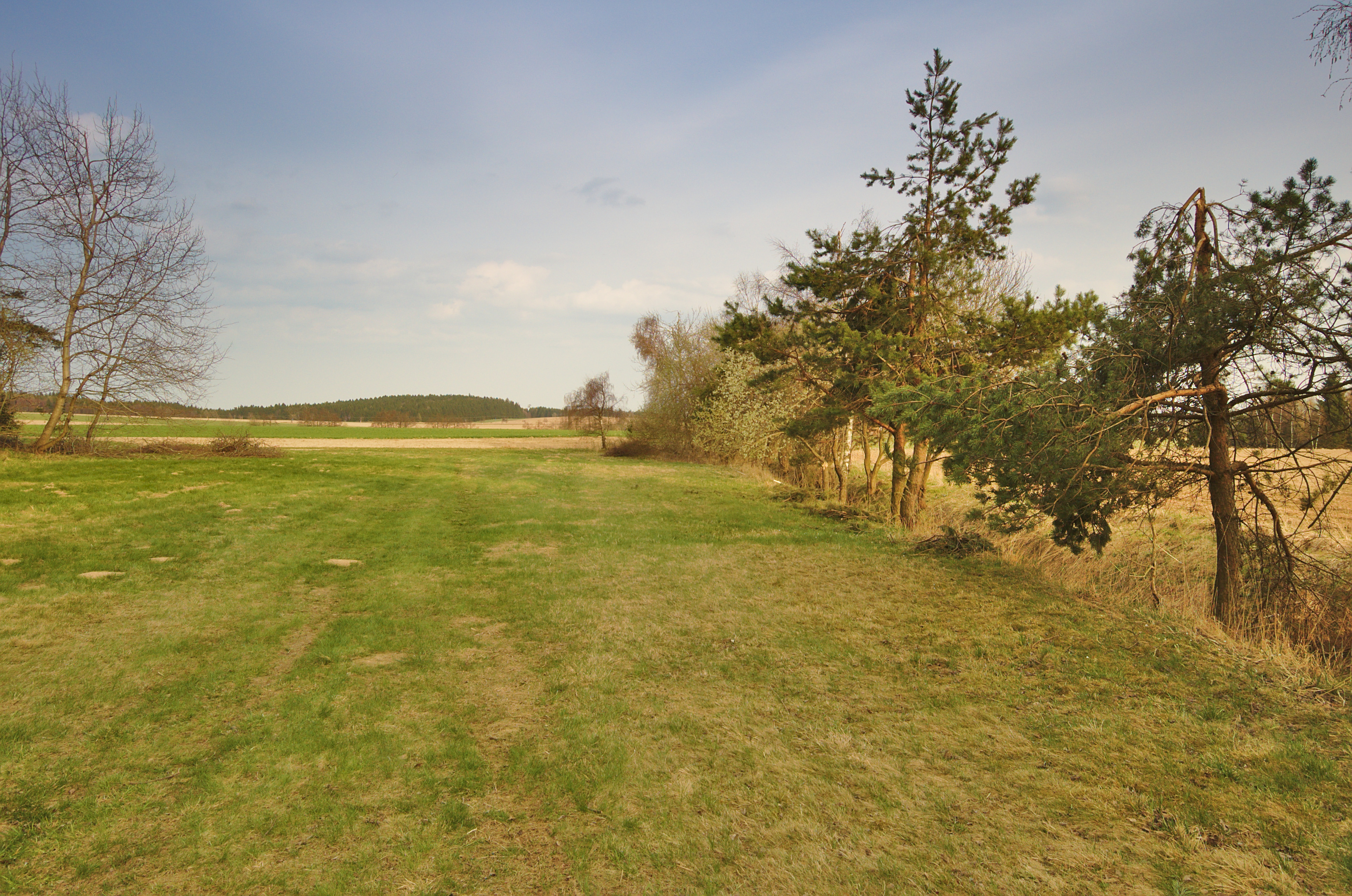 Přírodní památka Rašeliniště v Klozovci, okres Prostějov